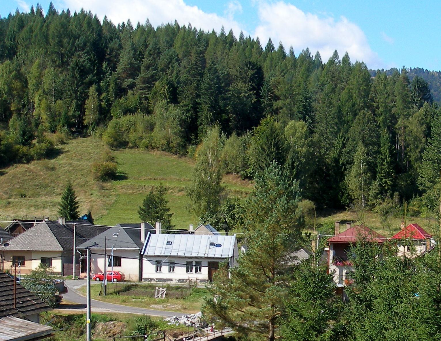 Spišská obec Stará Voda okres Gelnica